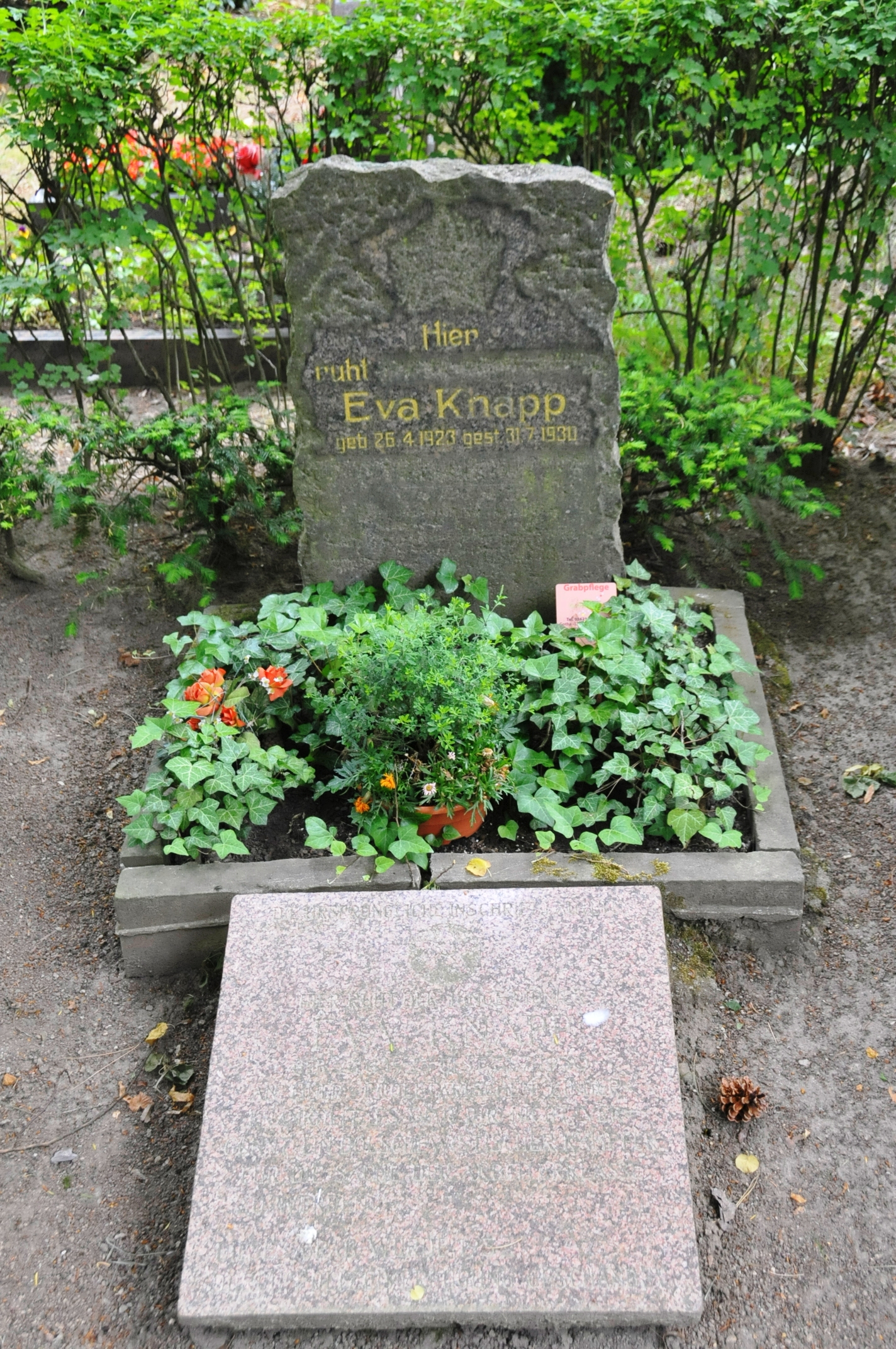 Grabstätte der Eva Knapp auf dem Gothaer Friedhof